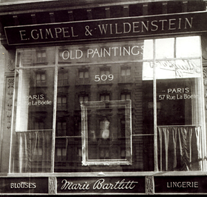 Antiga fachada da Gimple & Wildenstein em Nova York, 1907.